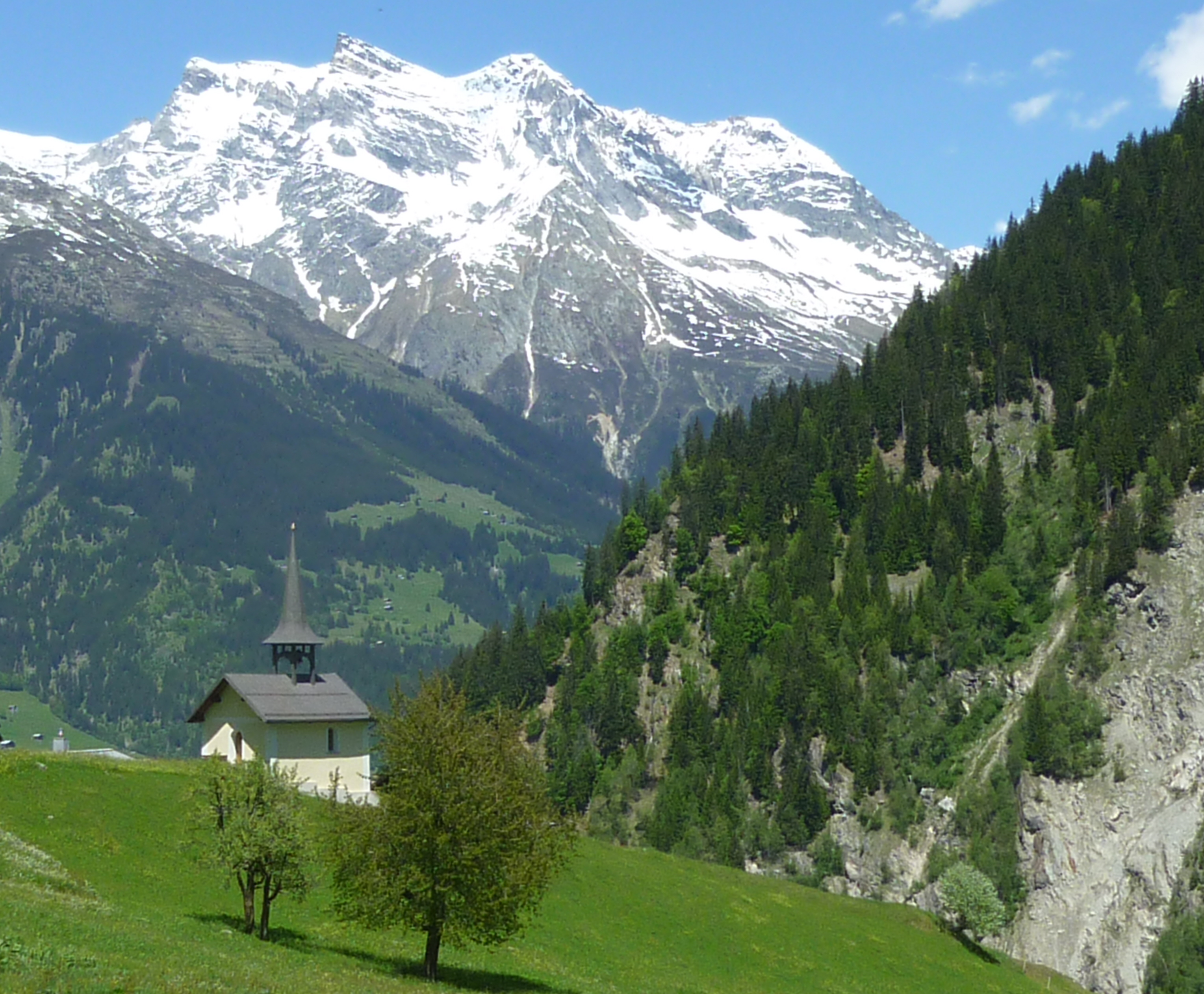 Val Sumvitg: Kapelle St. Paul in Val; Richtung Norden